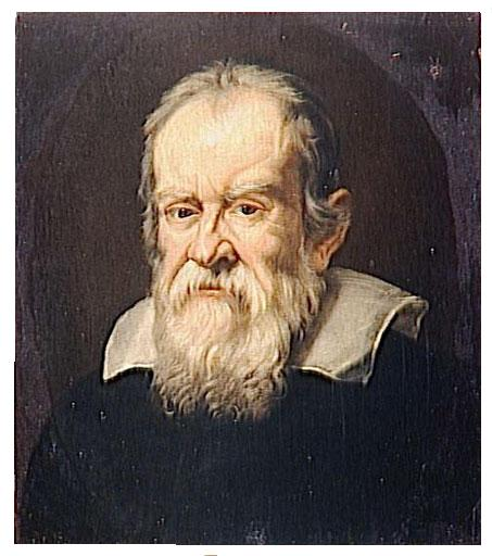 Ritratto di Galilei, olio su tela, 51 x 44 cm, Versailles, Musée national du château et des Trianons